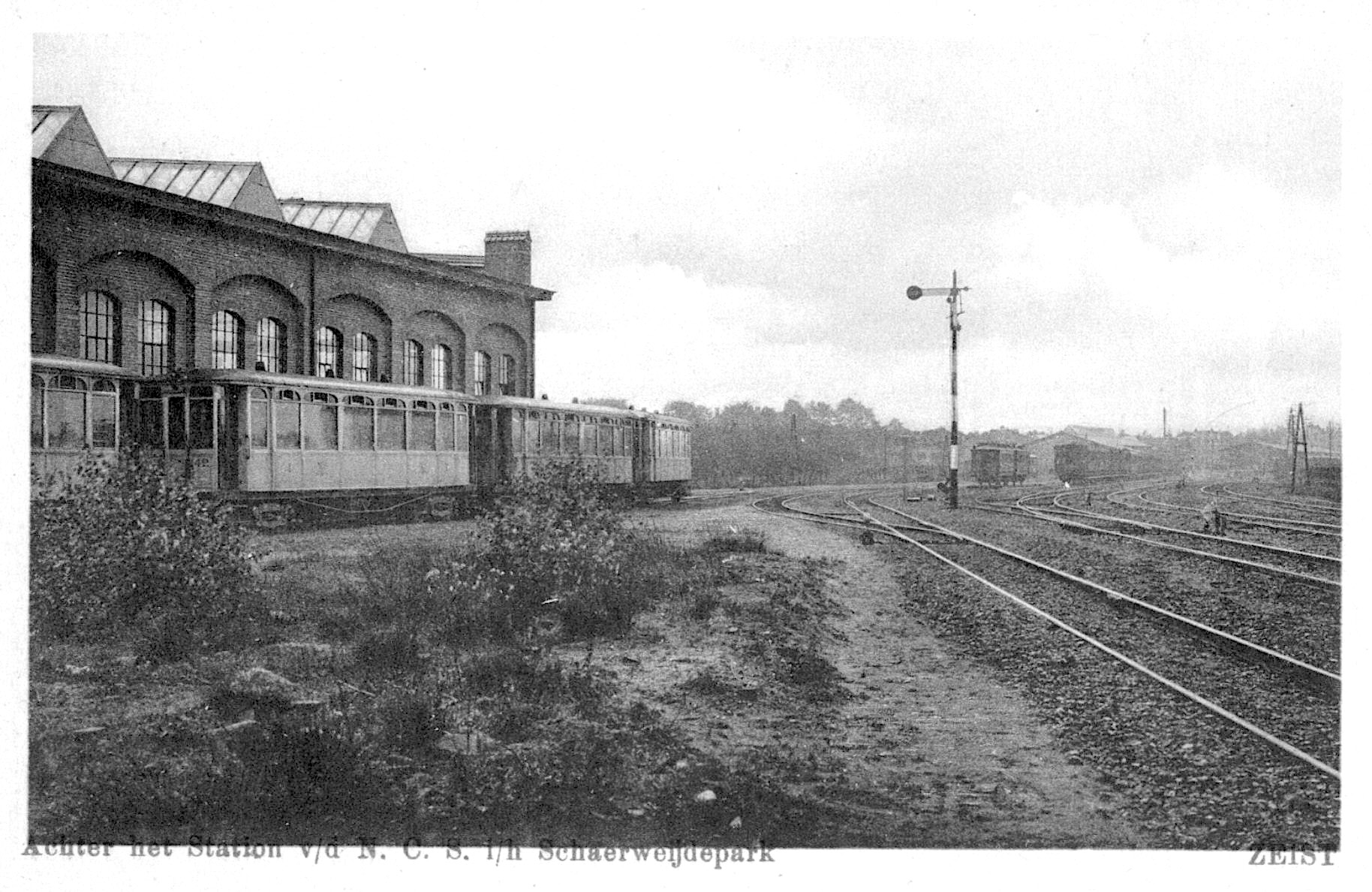 Emplacement bij Station Zeist met links rijtuigen van de OSM / NBM; circa 1910. Collectie van het Utrechts Archief.